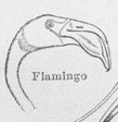 Flamingokopf